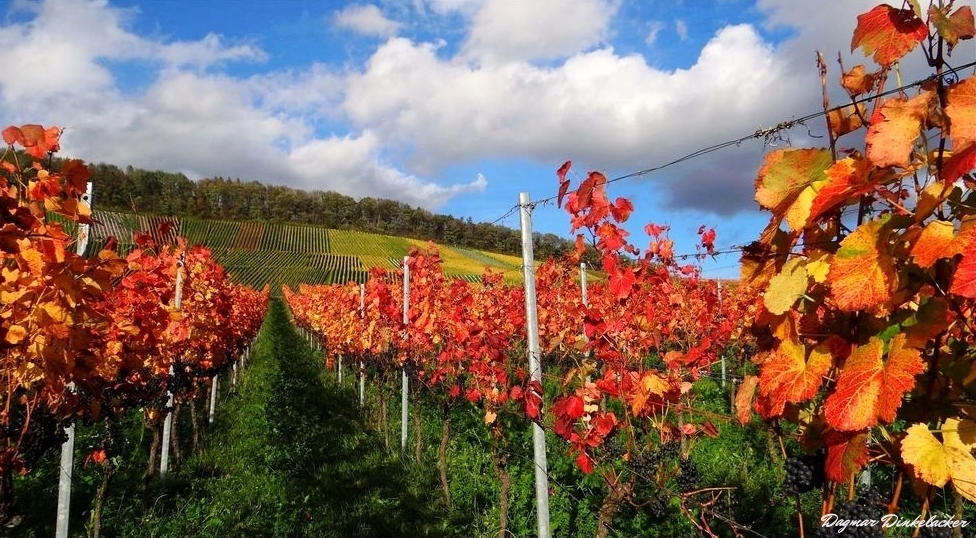 Weinberge in Korb bei Waiblingen